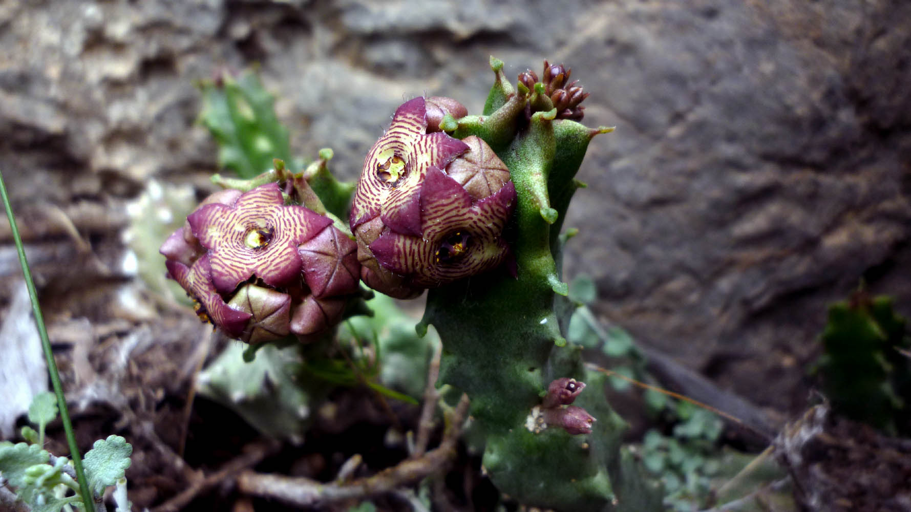 Caralluma europaea en El Portús (Parque natural de la Sierra de la Muela y Cabo Tiñoso) en Cartagena, Spain.